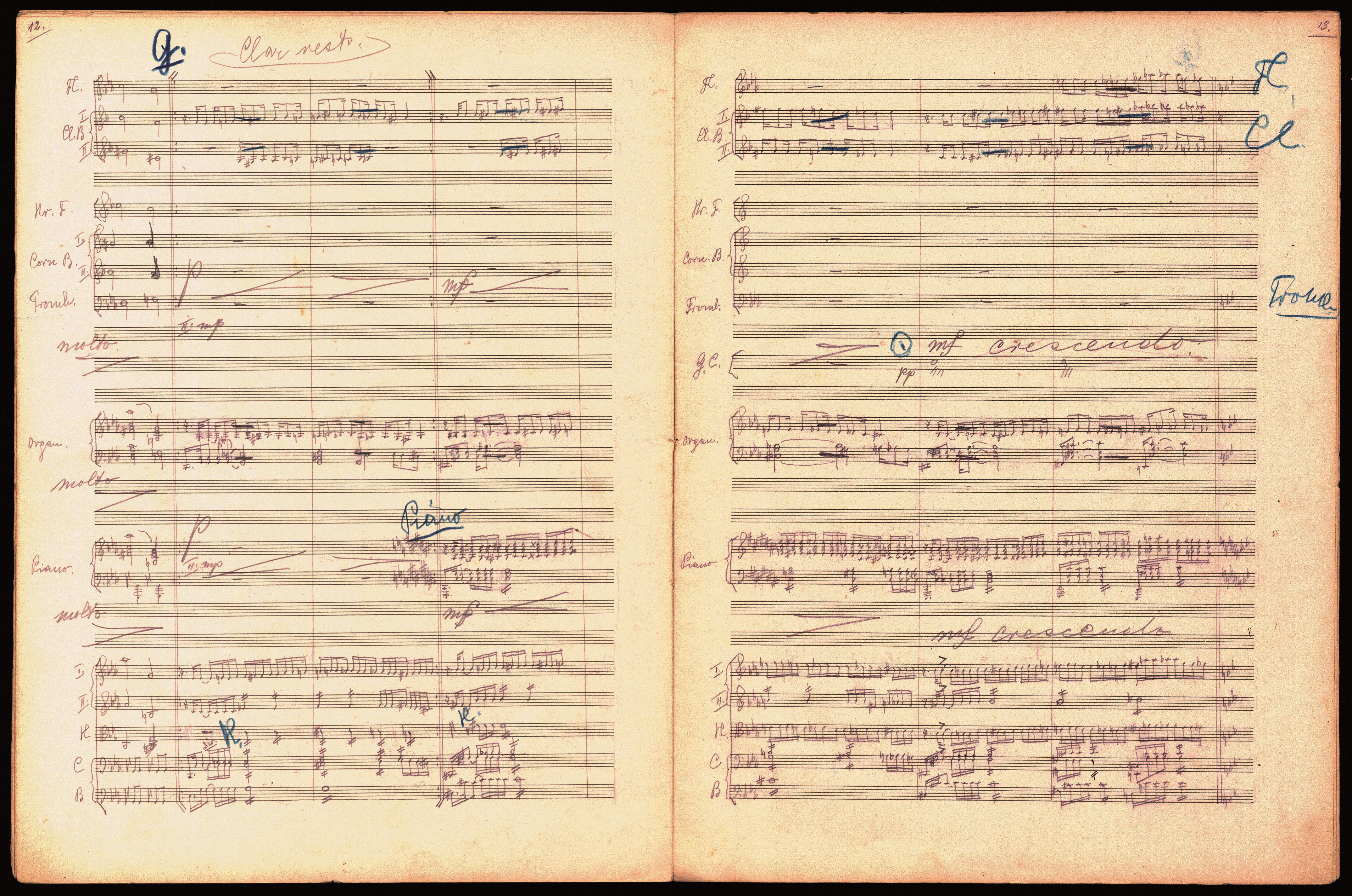 Unter nicht ganz geklärten Umständen gelangte die sogenannte Weltkriegssammlung in den Besitz des Hessischen Hauptstaatsarchivs. Darunter befinden sich auch Noten aus dem Internierungslager Ruhleben bei Berlin.1916 setzte dort der Dirigent Charles Frederic Adler eine für Klavier komponierte Ballade des ebenfalls inhaftierten britischen Komponisten Roland Bocquet für großes Orchester. Bocquet war um 1900 von England nach Dresden übergesiedelt und hatte sich doch als Liedkomponist einen Namen gemacht. Seine Stücke tragen deutlich impressionistische Züge, neigen aber auch immer wieder zu sehr avantgardistischen Passagen. Weitere Informationen: Zum Archivale